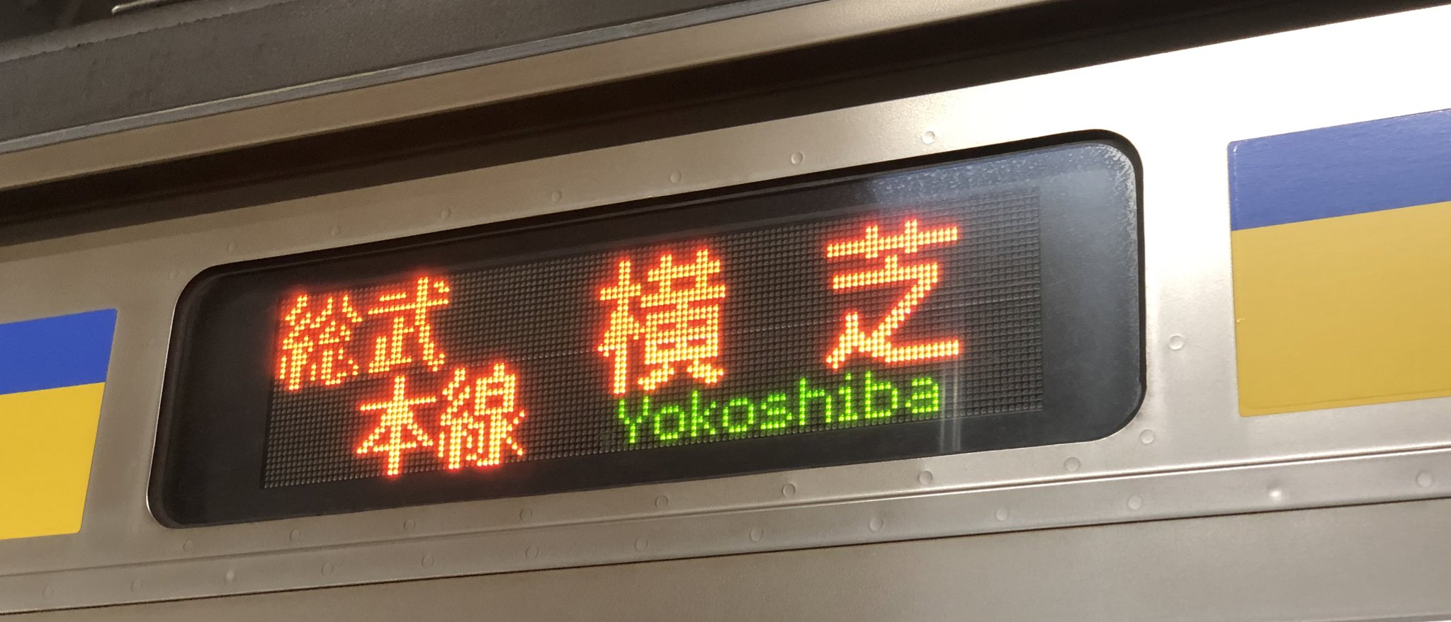 JR東日本209系2100番台による横芝行きのLED表示